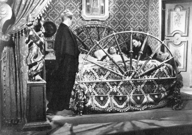 Foto di scena del film La bella addormentata (1942), regia di Luigi Chiarini. Fonte: Francesco Savio, Ma l'amore no Sonzogno, Milano 1975, pag. 43.